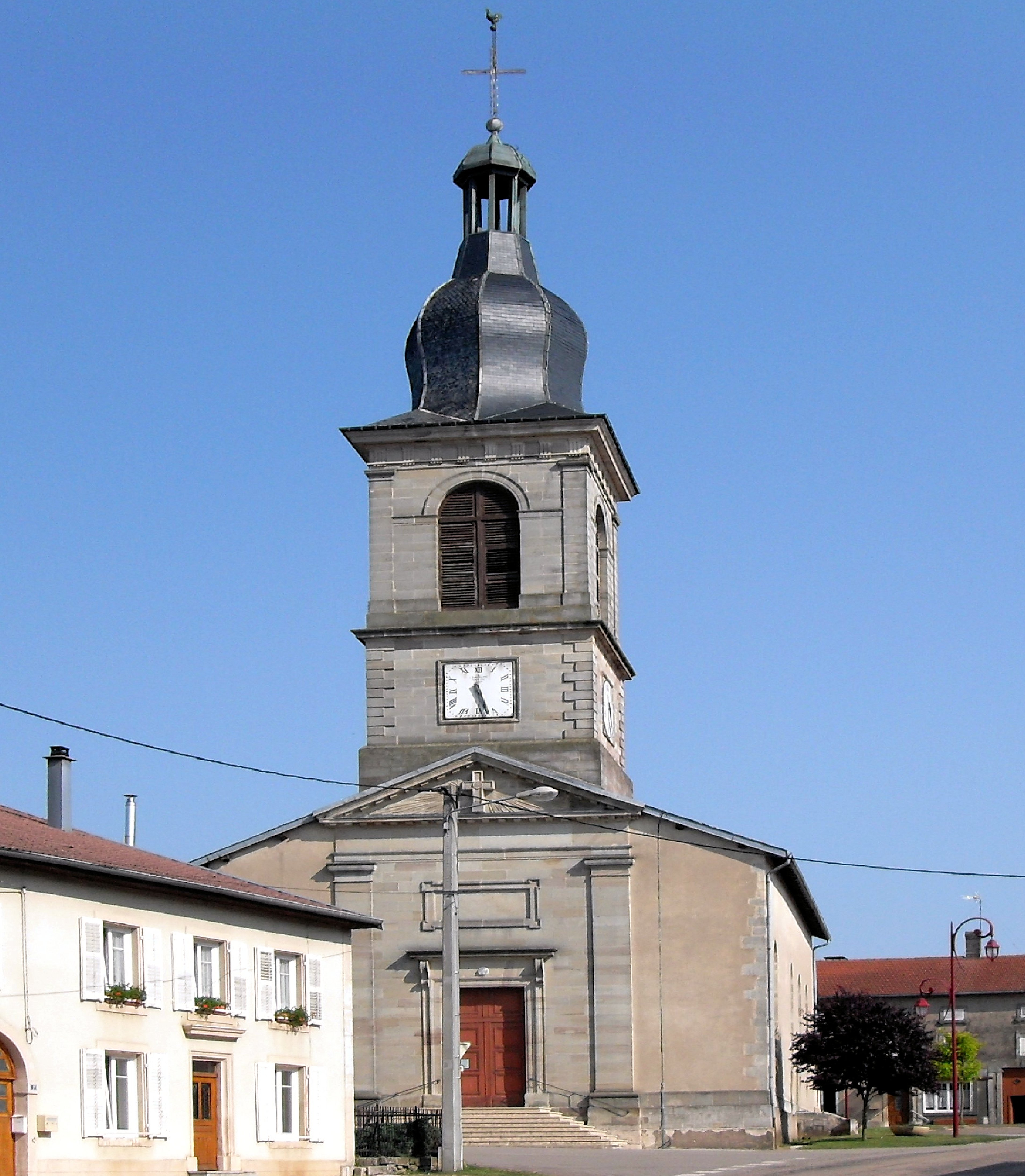 L*église des Saint-Médard à Damas-aux-Bois